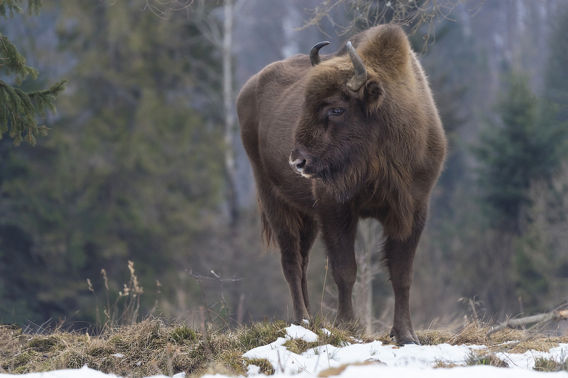 Сколівські Бескиди, Сколівський, Дрогобицький, Турківський р-ни. Зубри були завезені у Сколівські Бескиди у 2006р. у рамках програми "Відновлення популяції зубра європейського в українській частині Східних Карпат". Після вольєрної перетримки тварини успішно випущені в природні умови.